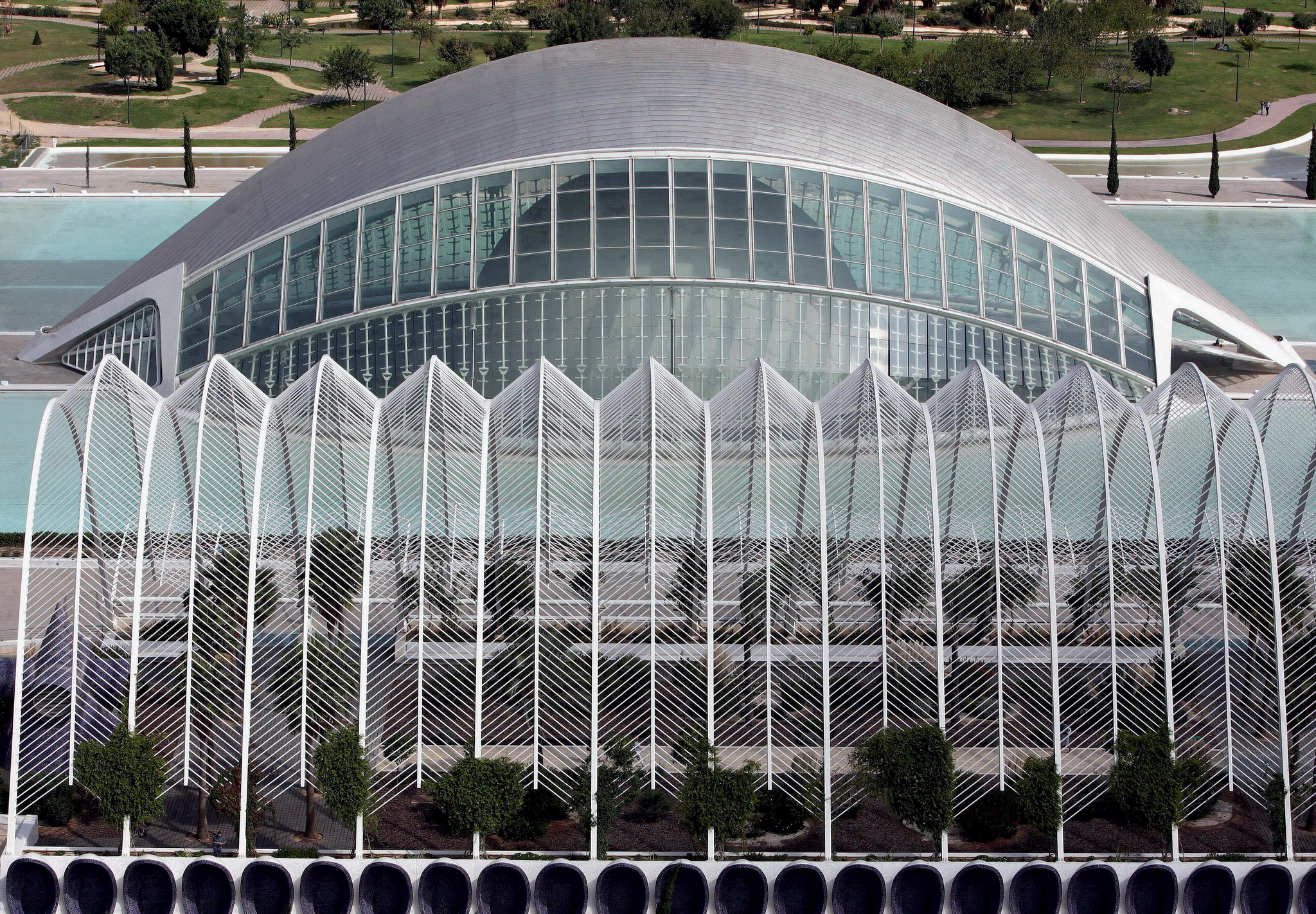 Ciudad de las Artes y las Ciencias. Valencia.